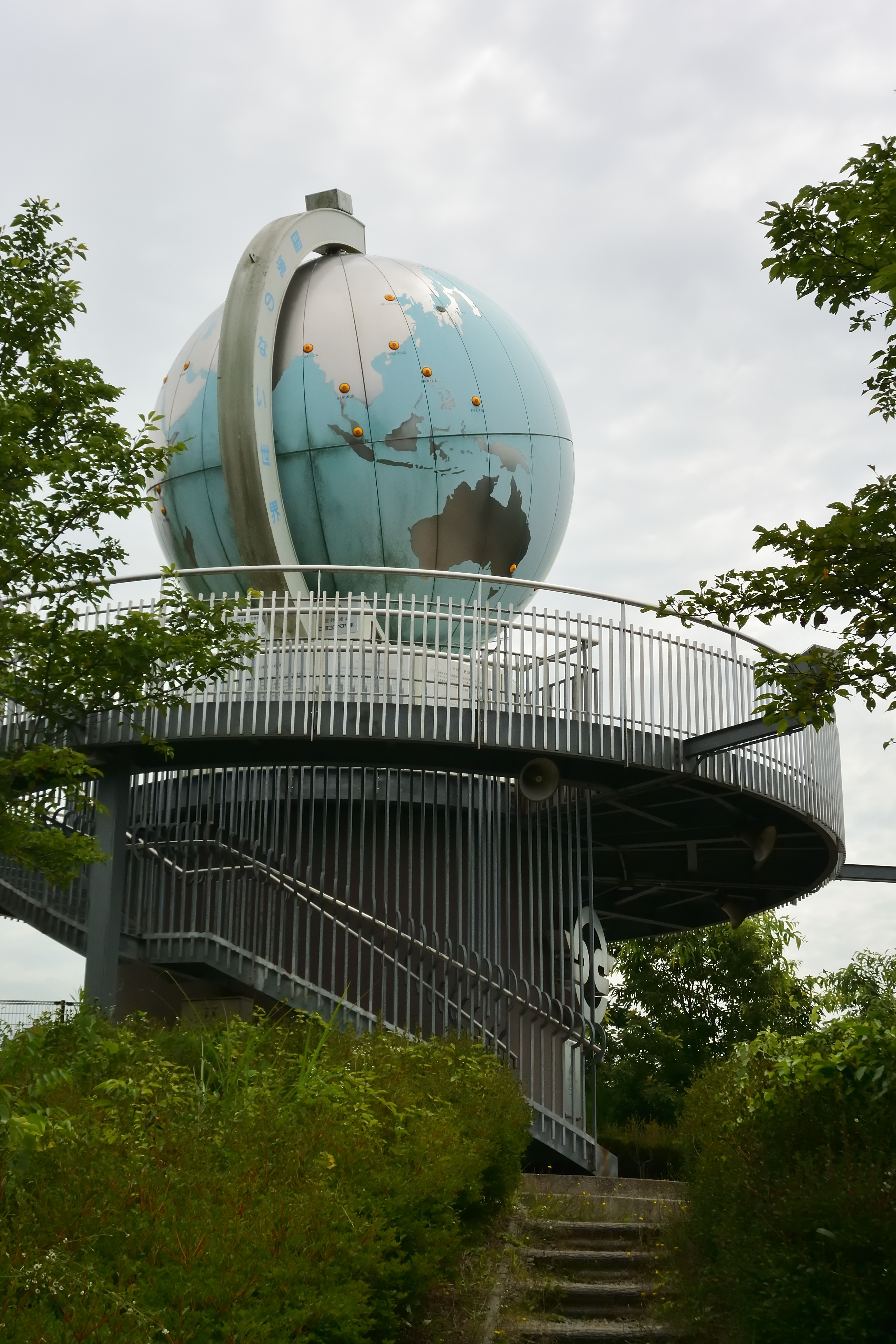 丸山総合公園地球儀時計